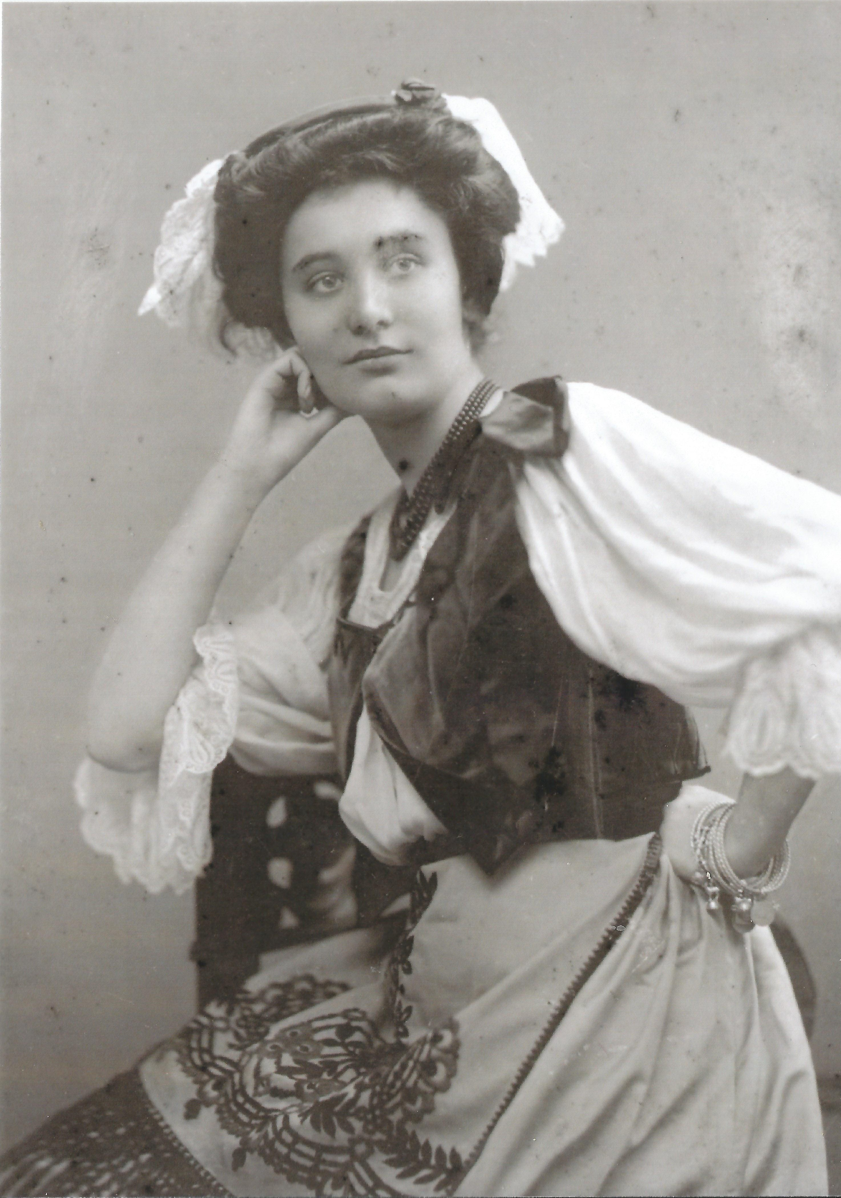 Boldogfai Farkas Dénes országgyűlési képviselőné szentjánosi Szűcs Mária Stefánia (1891–1956)